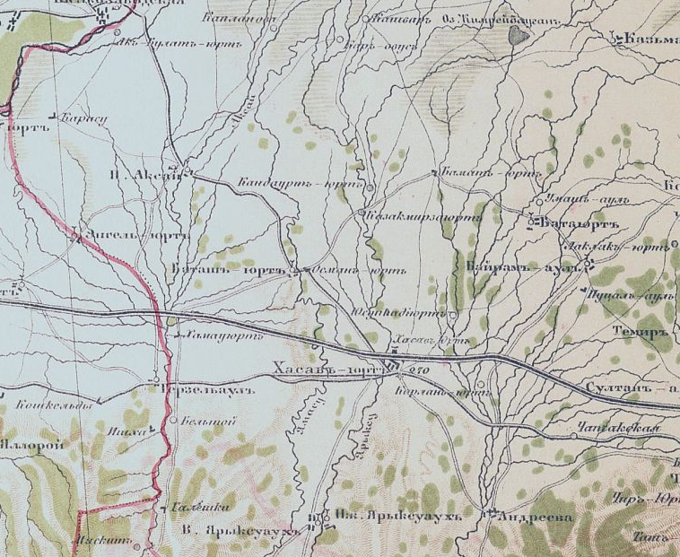 Карты Кавказа после 1777 г.